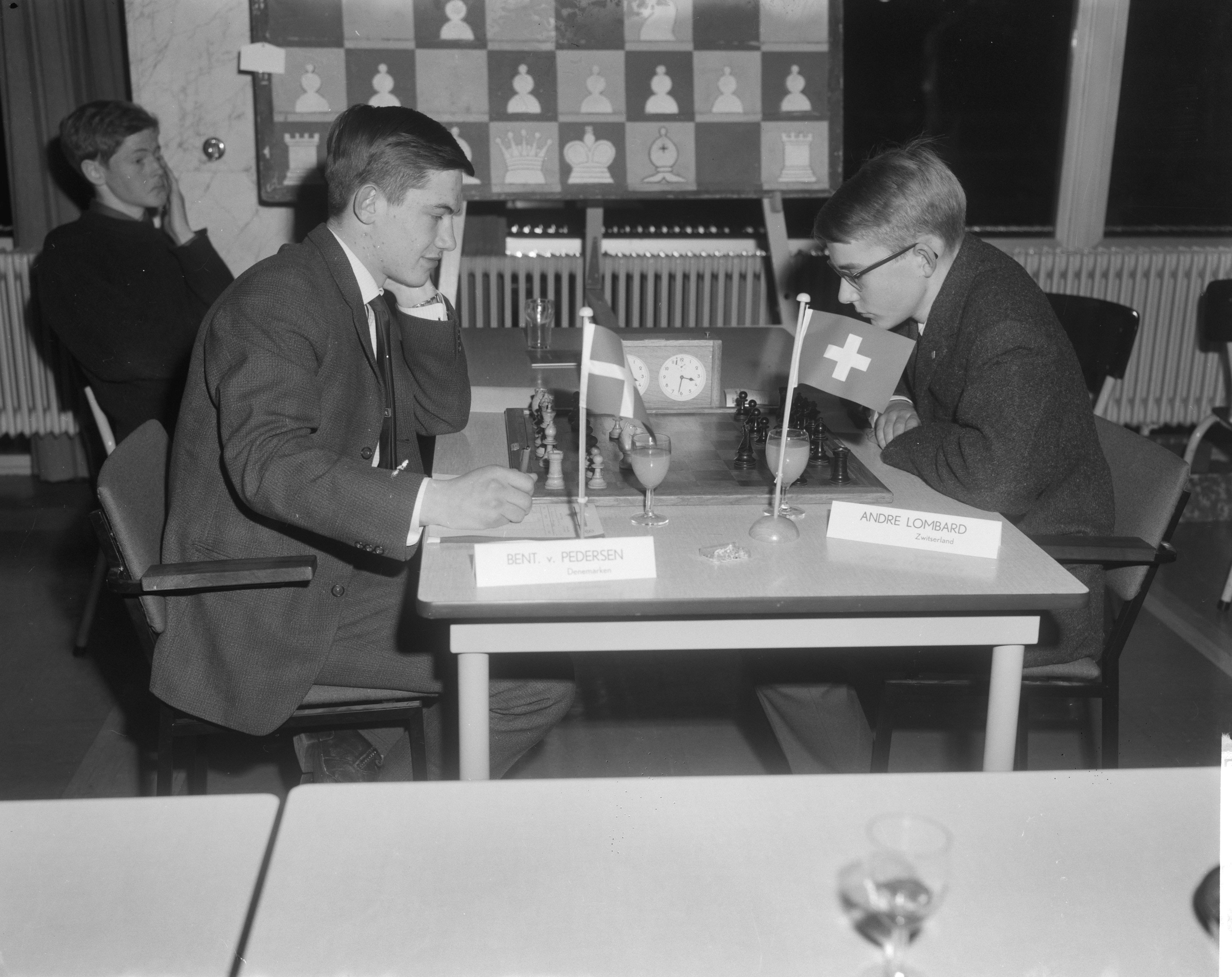 Collectie / Archief : Fotocollectie Anefo Reportage / Serie : [ onbekend ] Beschrijving : Internationaal Jeugd Schaaktoernooi te Groningen, links Bent V. Pedersen (Denemarken) en Andre Lombard (Zwitserland) Datum : 27 december 1965 Locatie : Groningen Trefwoorden : schaken, sport Persoonsnaam : Lombard, André, Pedersen, Bent van Fotograaf : Bilsen, Joop van / Anefo Auteursrechthebbende : Nationaal Archief Materiaalsoort : Negatief (zwart/wit) Nummer archiefinventaris : bekijk toegang 2.24.01.04 Bestanddeelnummer : 918-6097